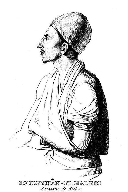 "Souleymân-El Haleby, assassin de Kléber".